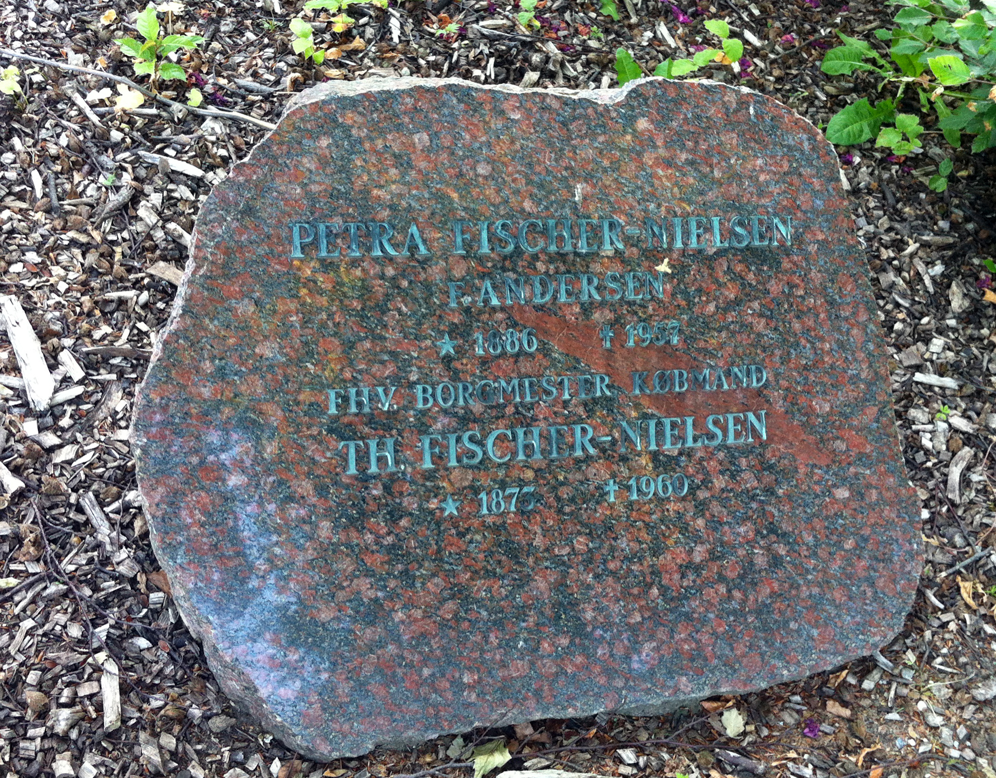 Gravsten for Therchild Fischer-Nielsen, 14. maj 2014